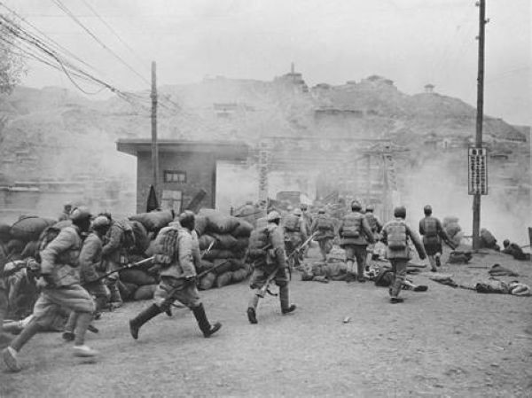 1949年8月26日中国人民解放军攻占兰州黄河铁桥